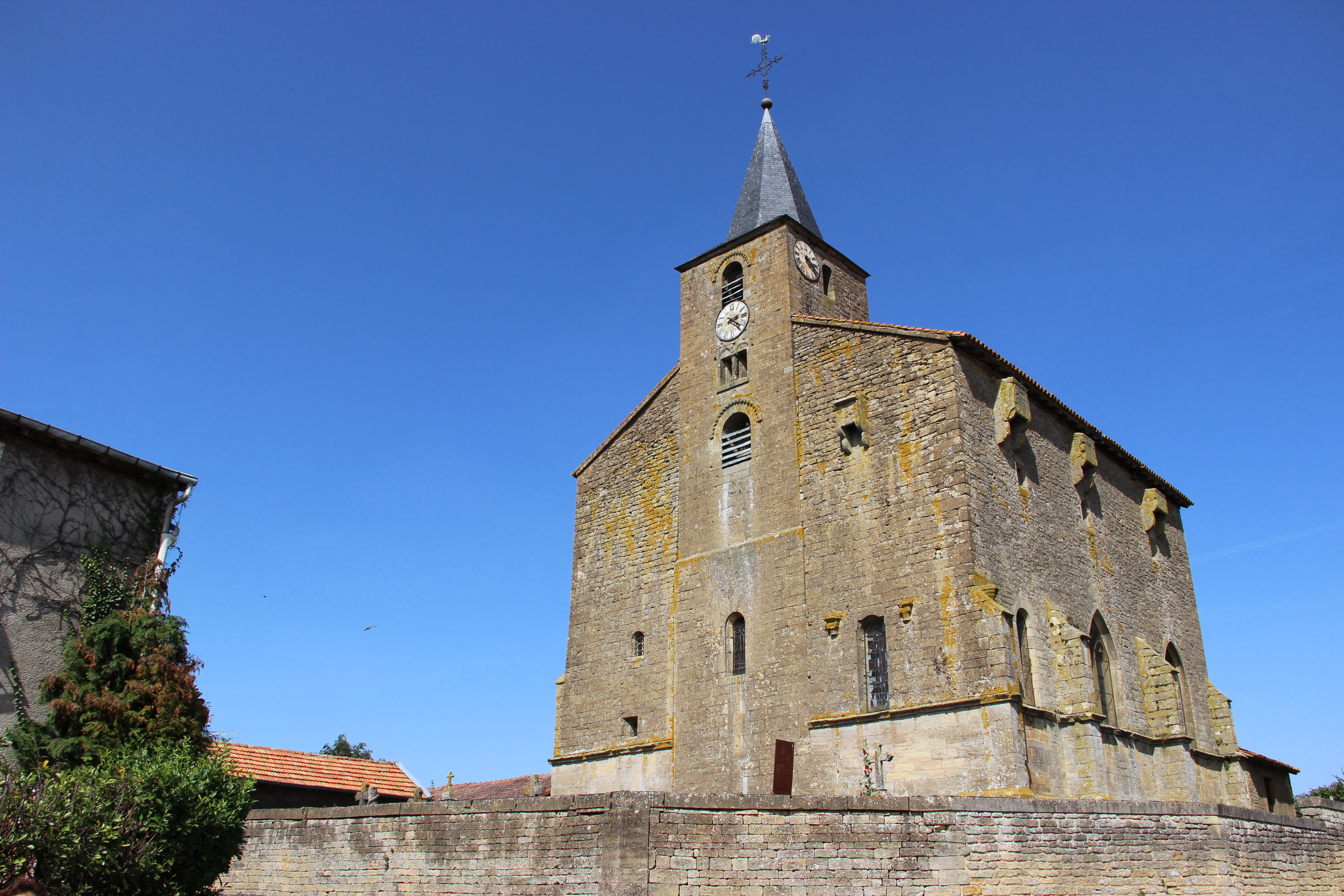 Eglise de Saint-pierrevillers